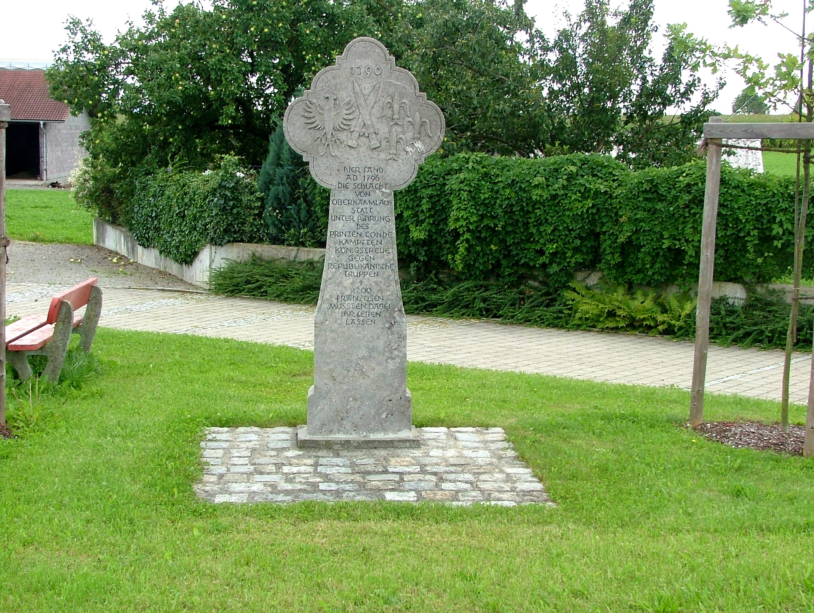 Schlacht von Oberkammlach anno 1796